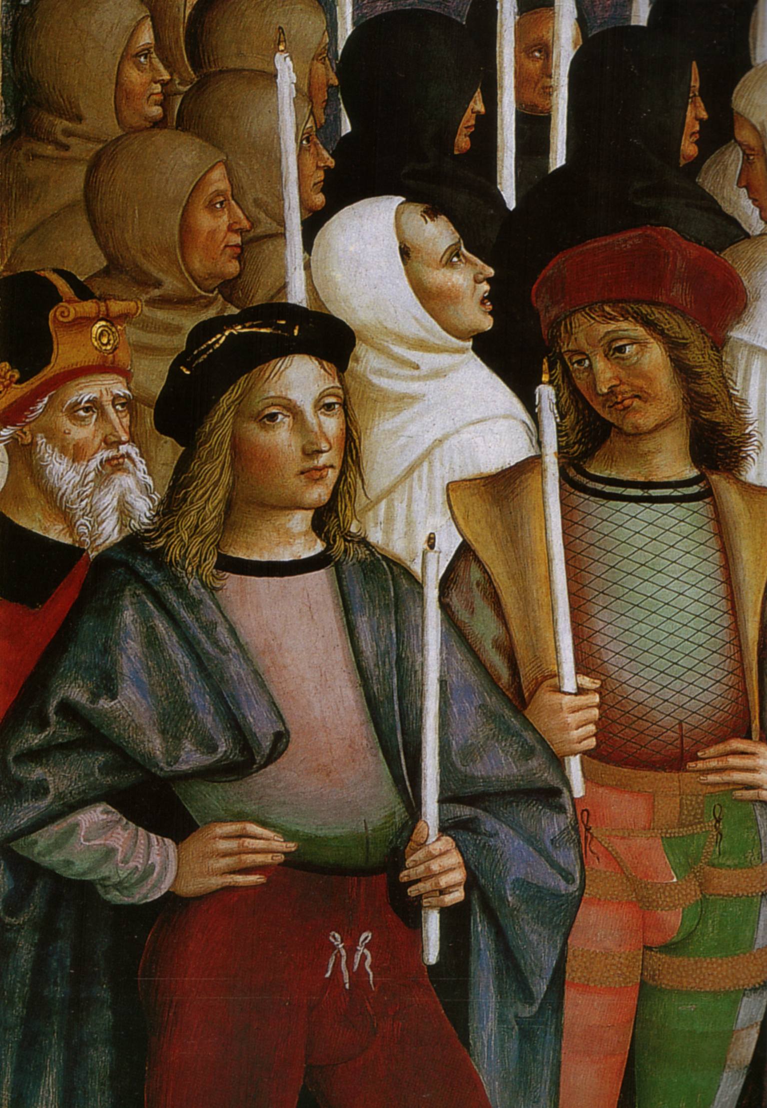 Pinturicchio, libreria piccolomini, dettaglio